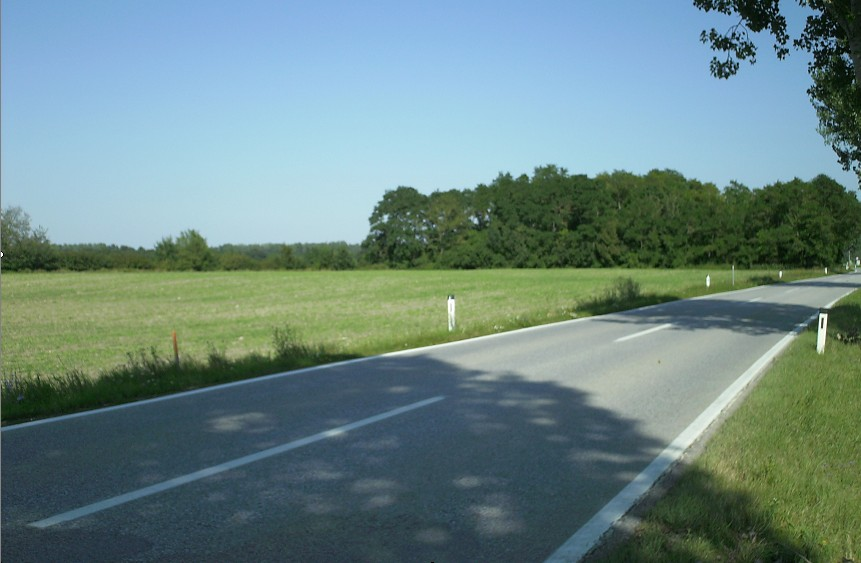 Das Wäldchen Weingartl oder Remise bei Zwentendorf an der Donau/NÖ, hier stand einst ein Römerkastell und später eine mittelalterliche Festungsanlage (Motte), Blick aus Südwest.